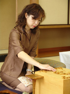 Hiroe Nakai